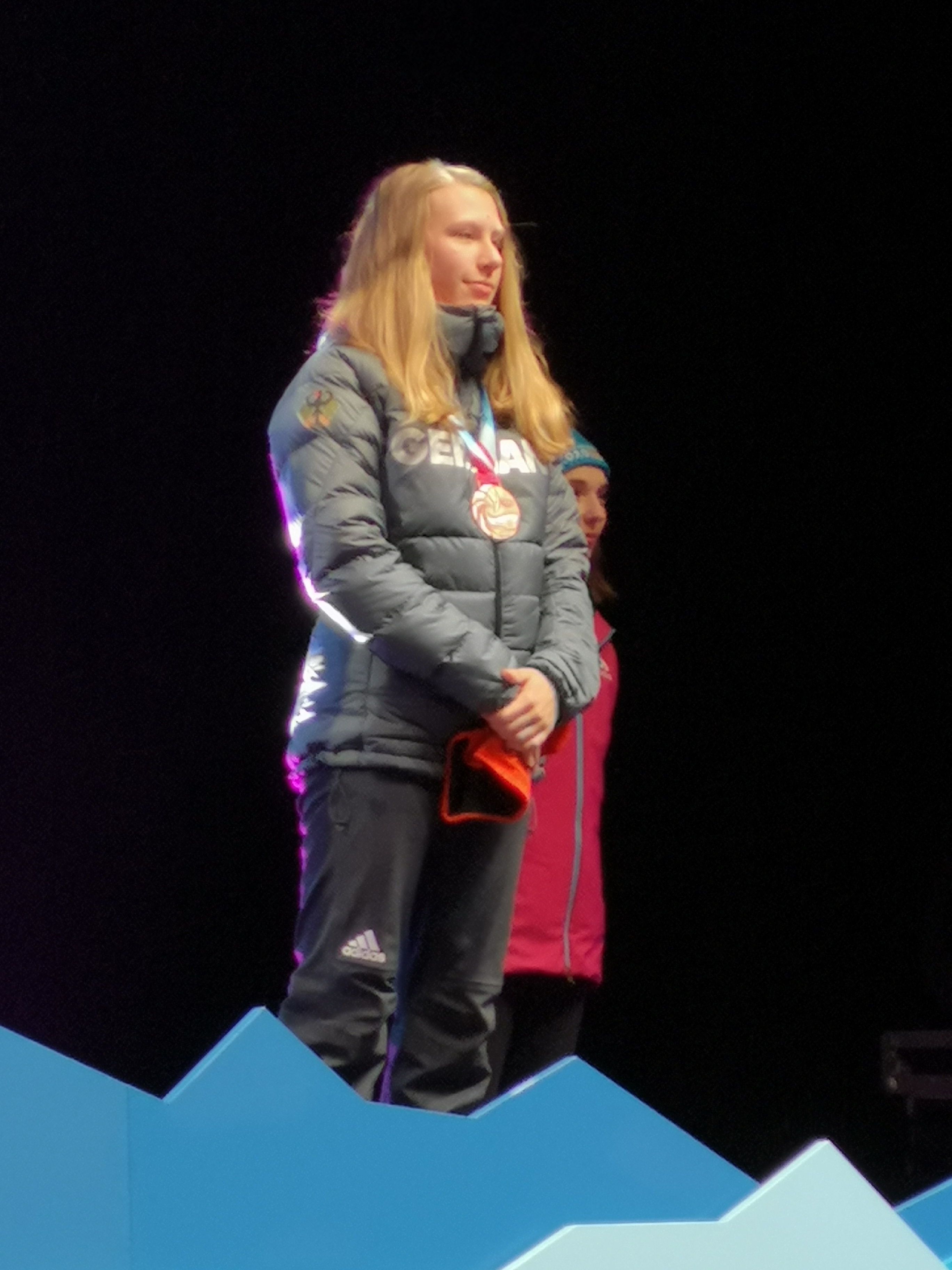 Jenny Nowak pendant la remise des médailles du combiné nordique féminin individuel aux JOJ de Lausanne 2020.